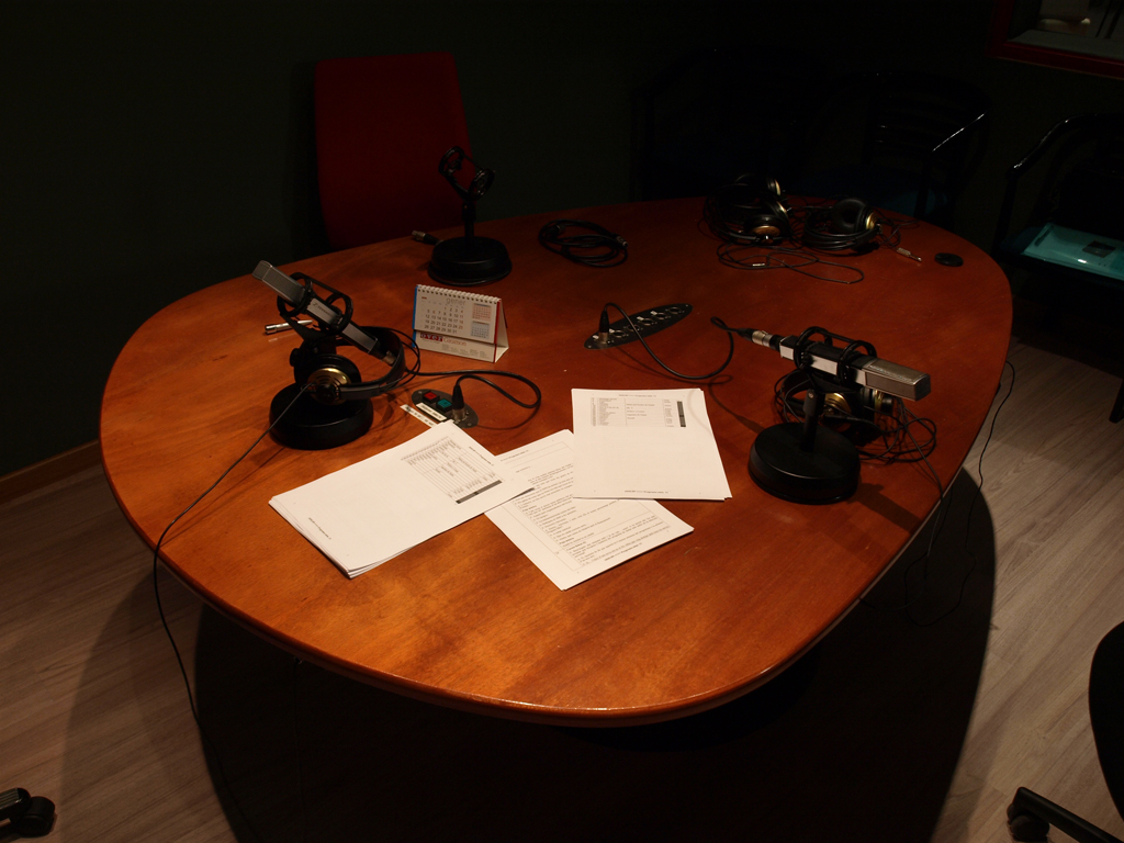 Estudi 3 de Ràdio Ciutat de Badalona durant la gravació del programa Tot està inventat